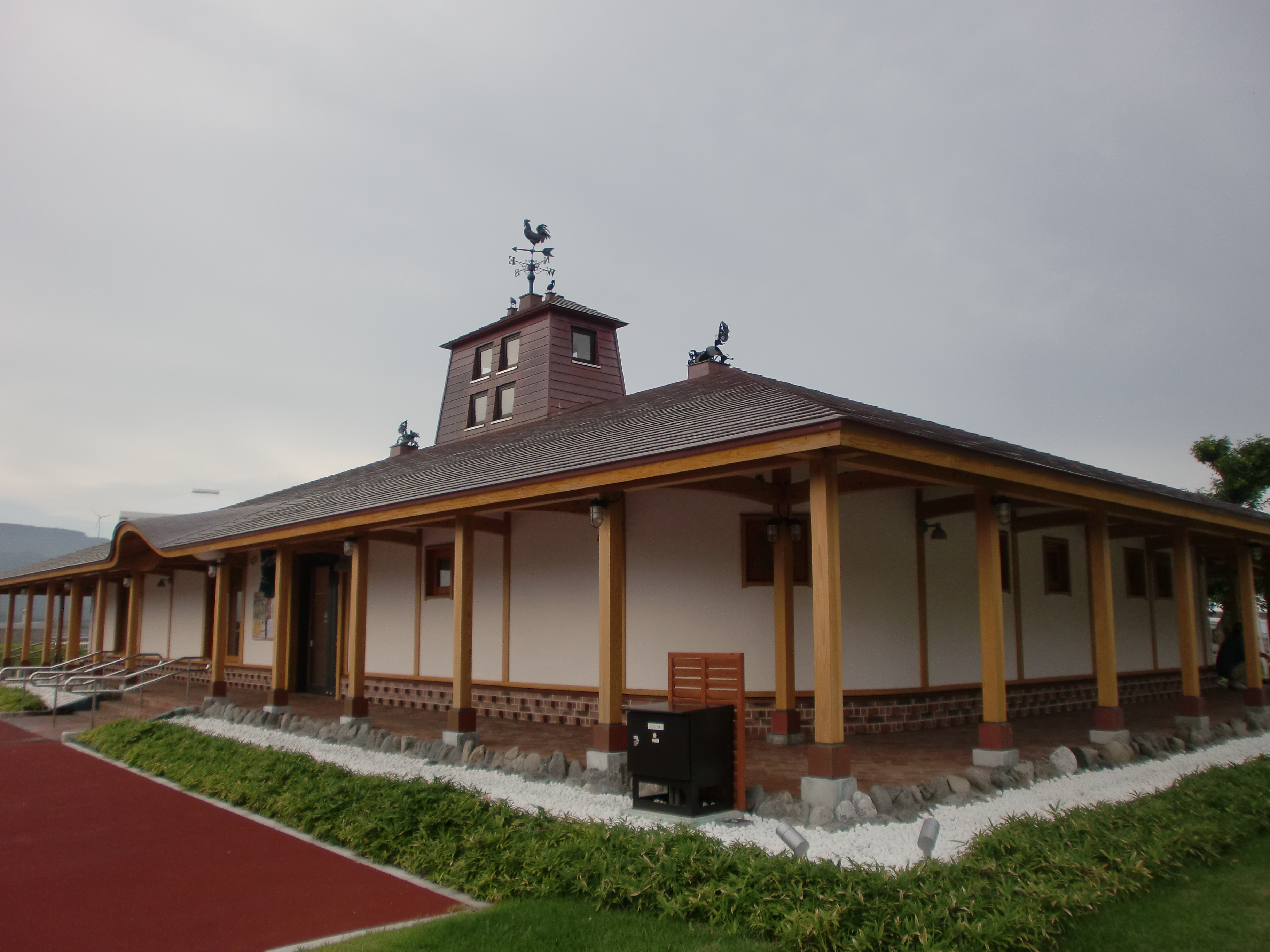 川内港の甑島商船高速船旅客ターミナル